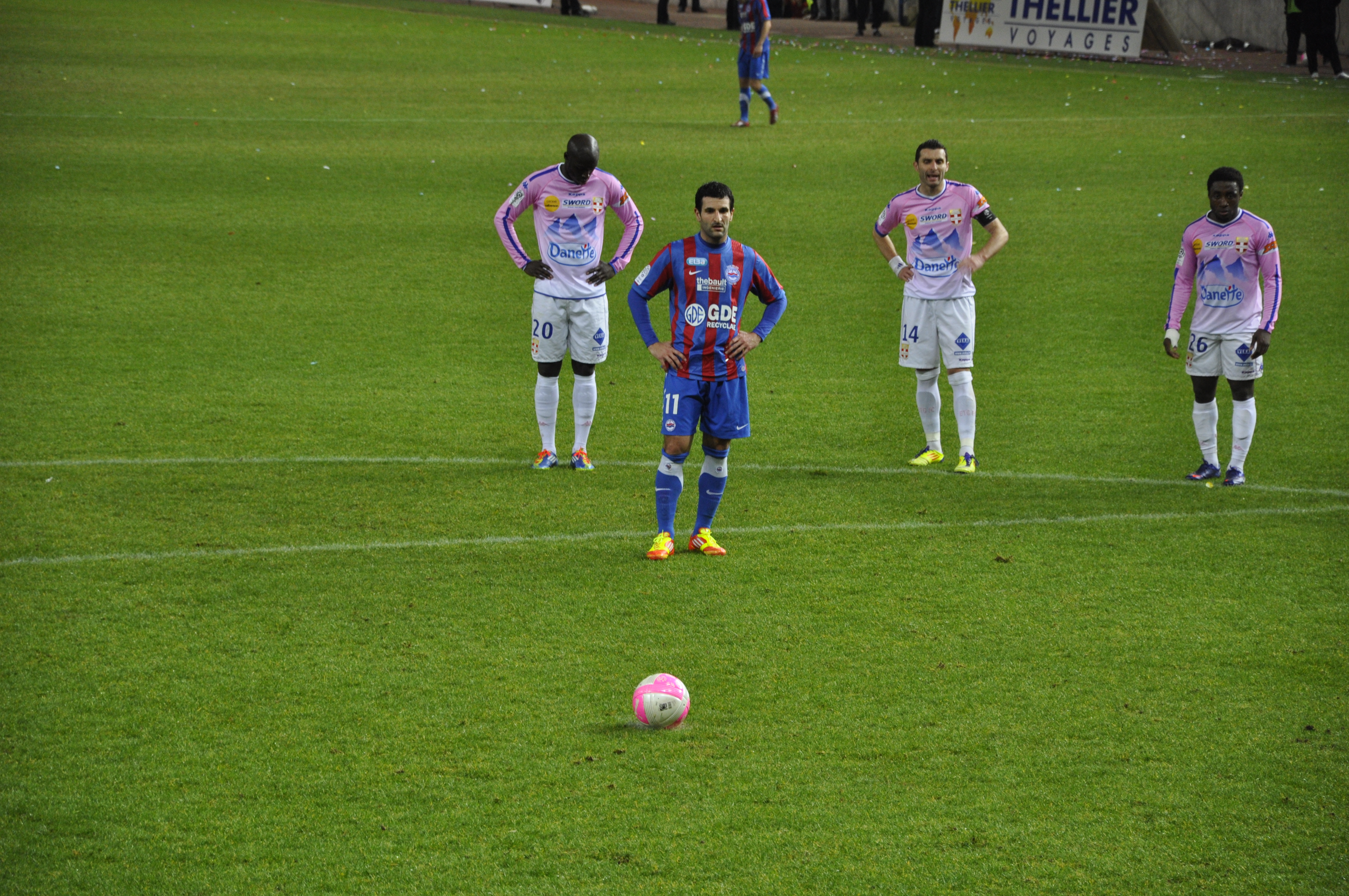 Pierre-alain Frau tirant un pénalty contre Évian Thonon Gaillard